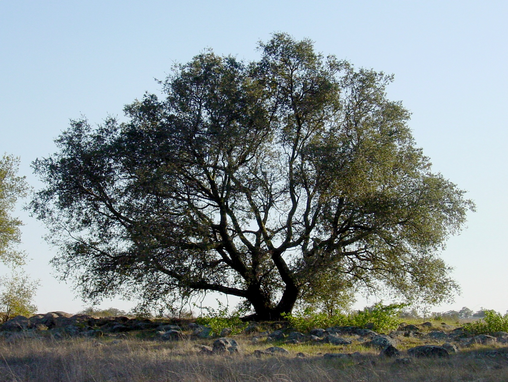 Author: Noah Elhardt Subject: Engelmann Oak, Quercus engelmannii